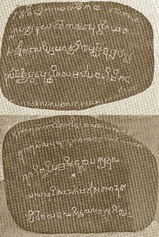 Kedukan Bukit Inscription, 683 AD, South Sumatra province, Indonesia